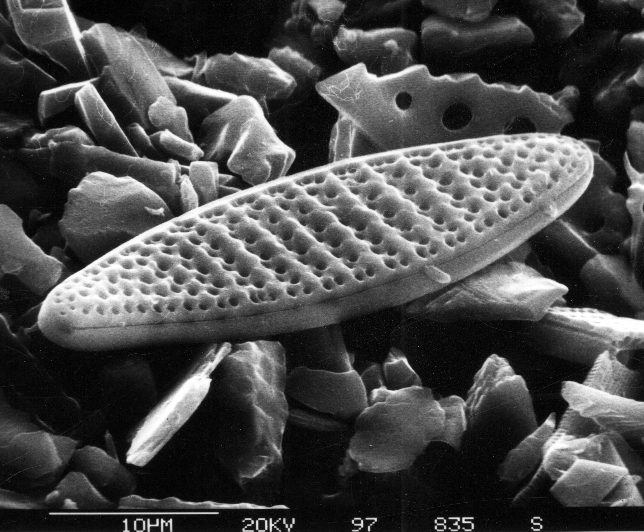 Diatom Nitzschia kerguelensis